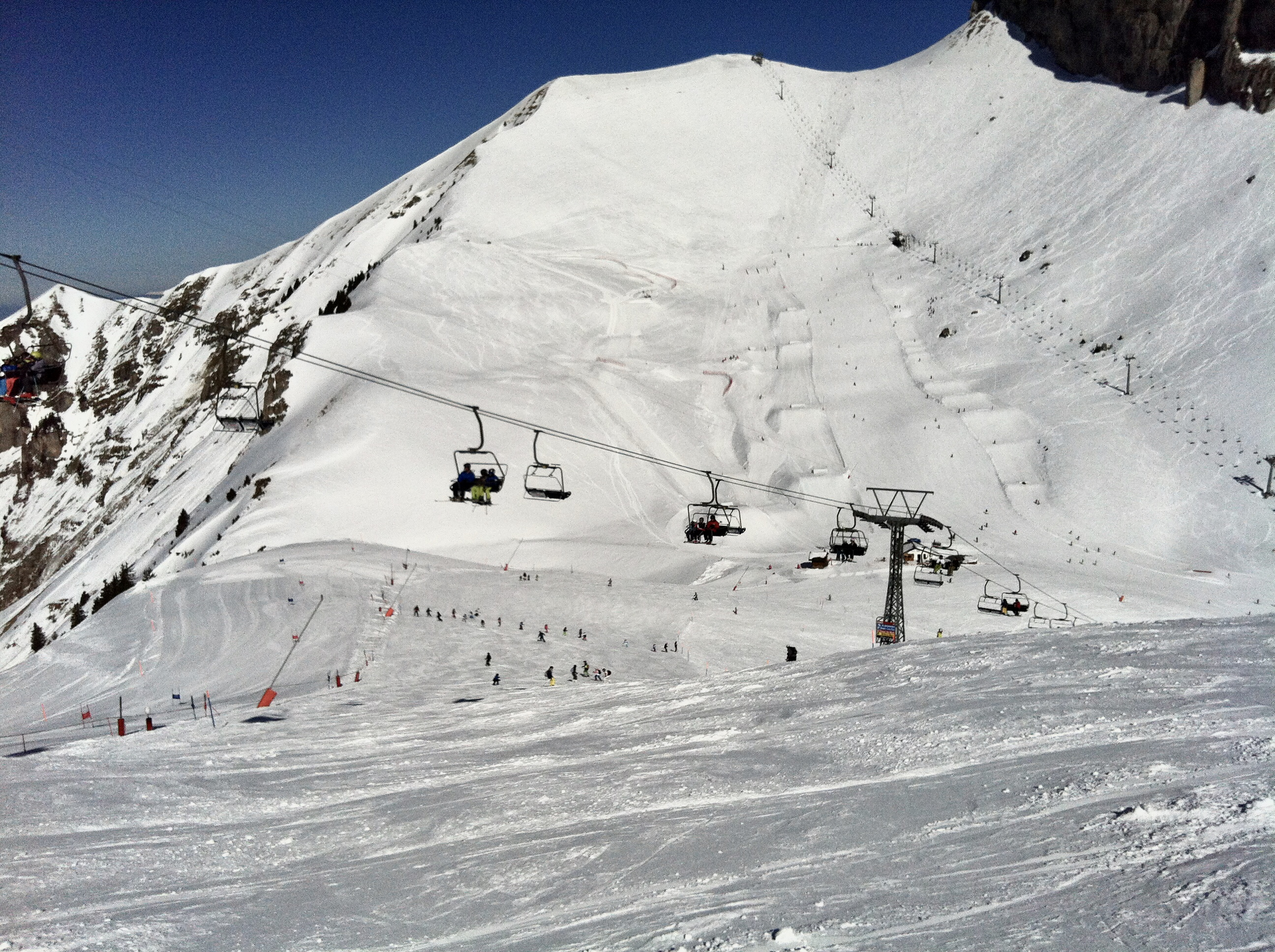 Leysin